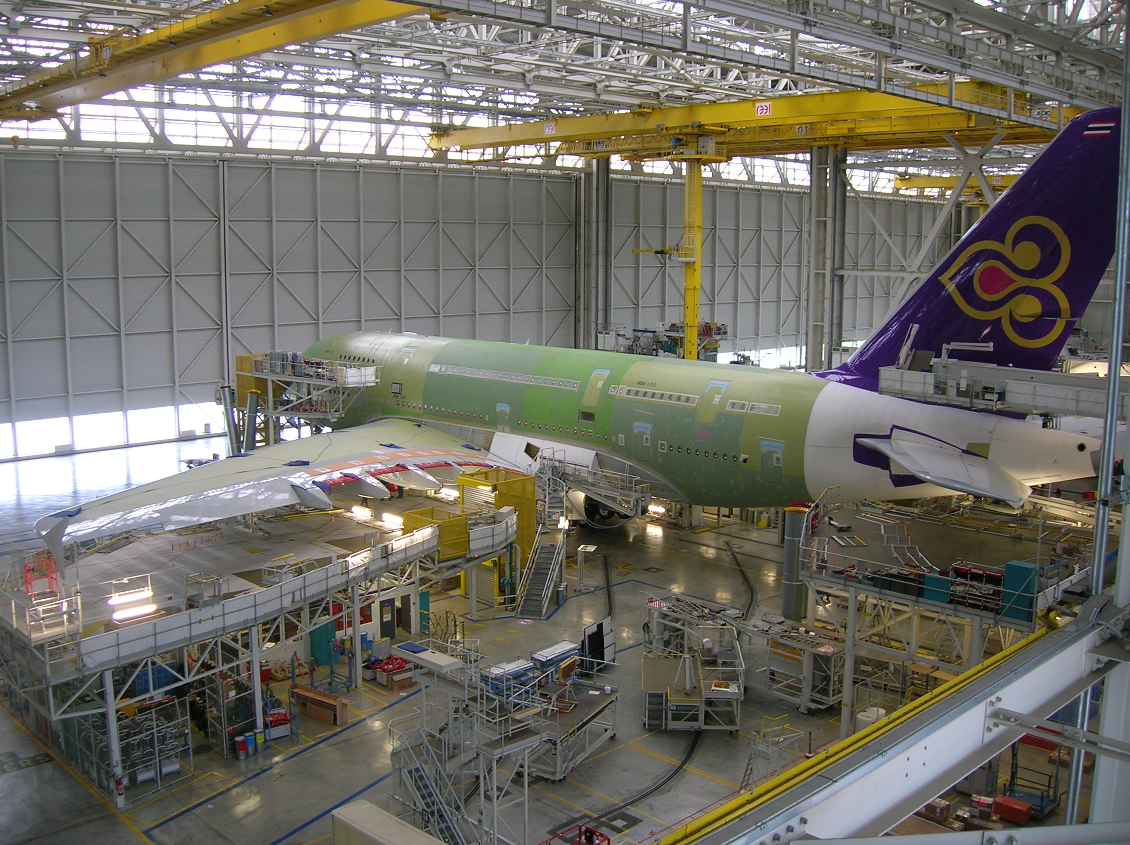 Airbus Lagardère P30 - Eqt & powerplant install, Systems testing (MSN100)